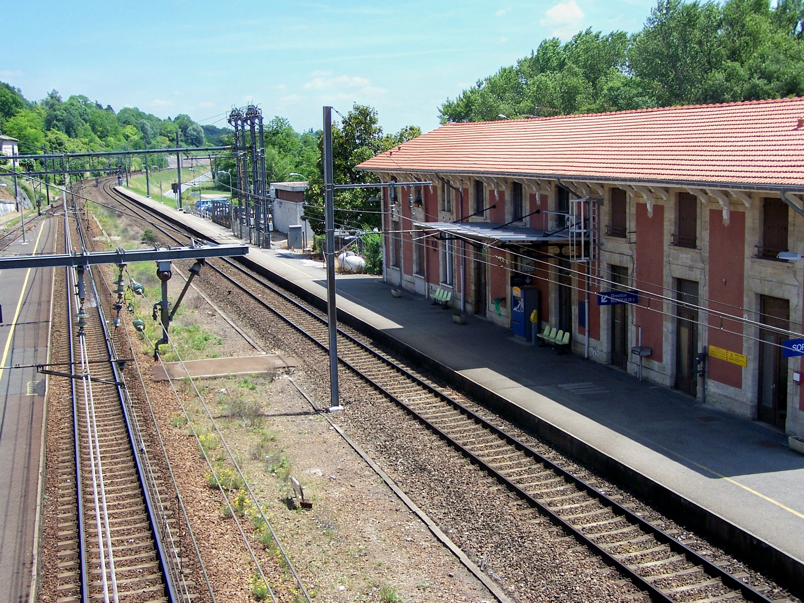 Gare de La Réole, Gironde, France